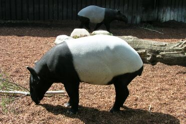 Skaberaktapir (Tapirus indicus)